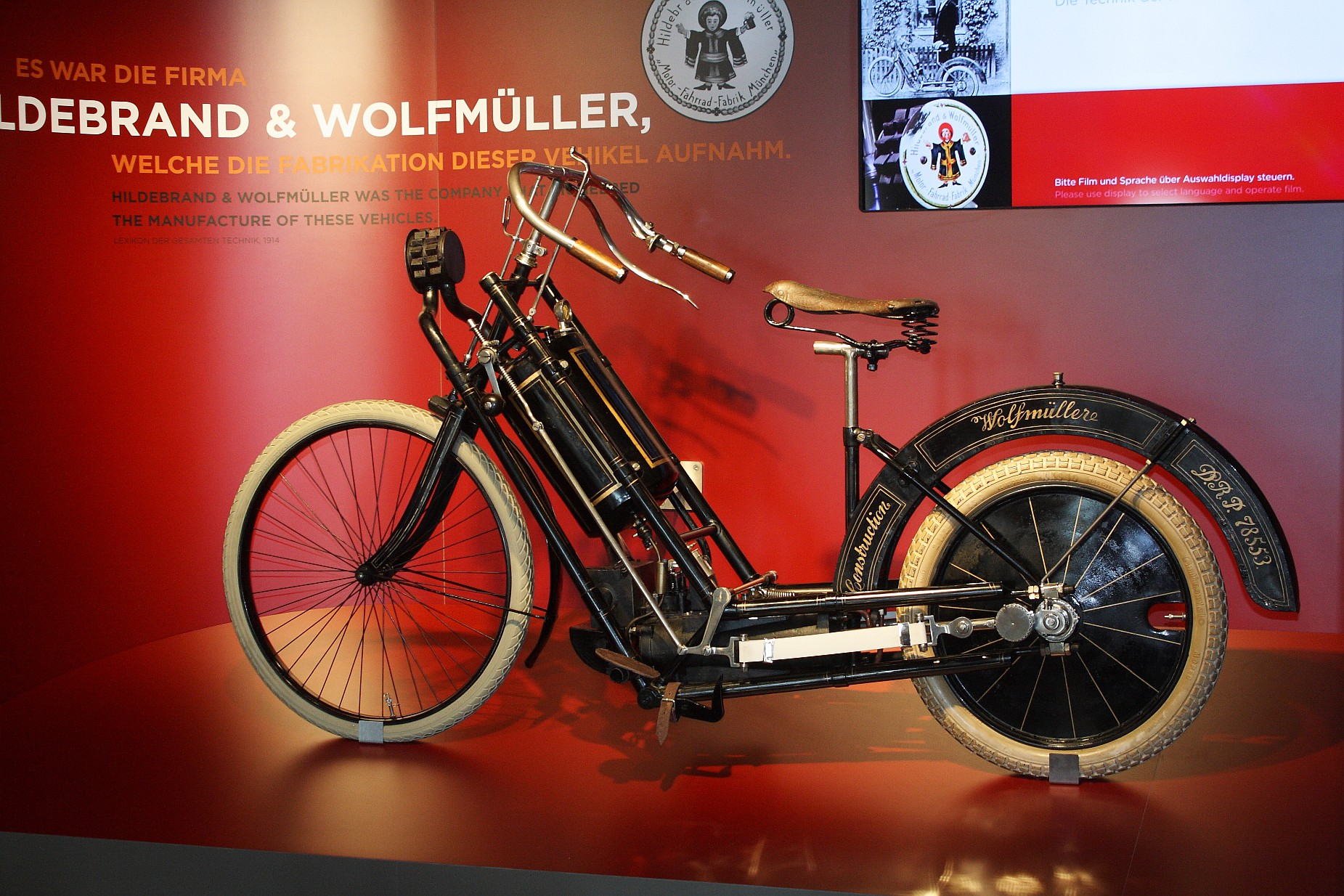 Hildebrand und Wolfmüller im PS-Speicher in Einbeck